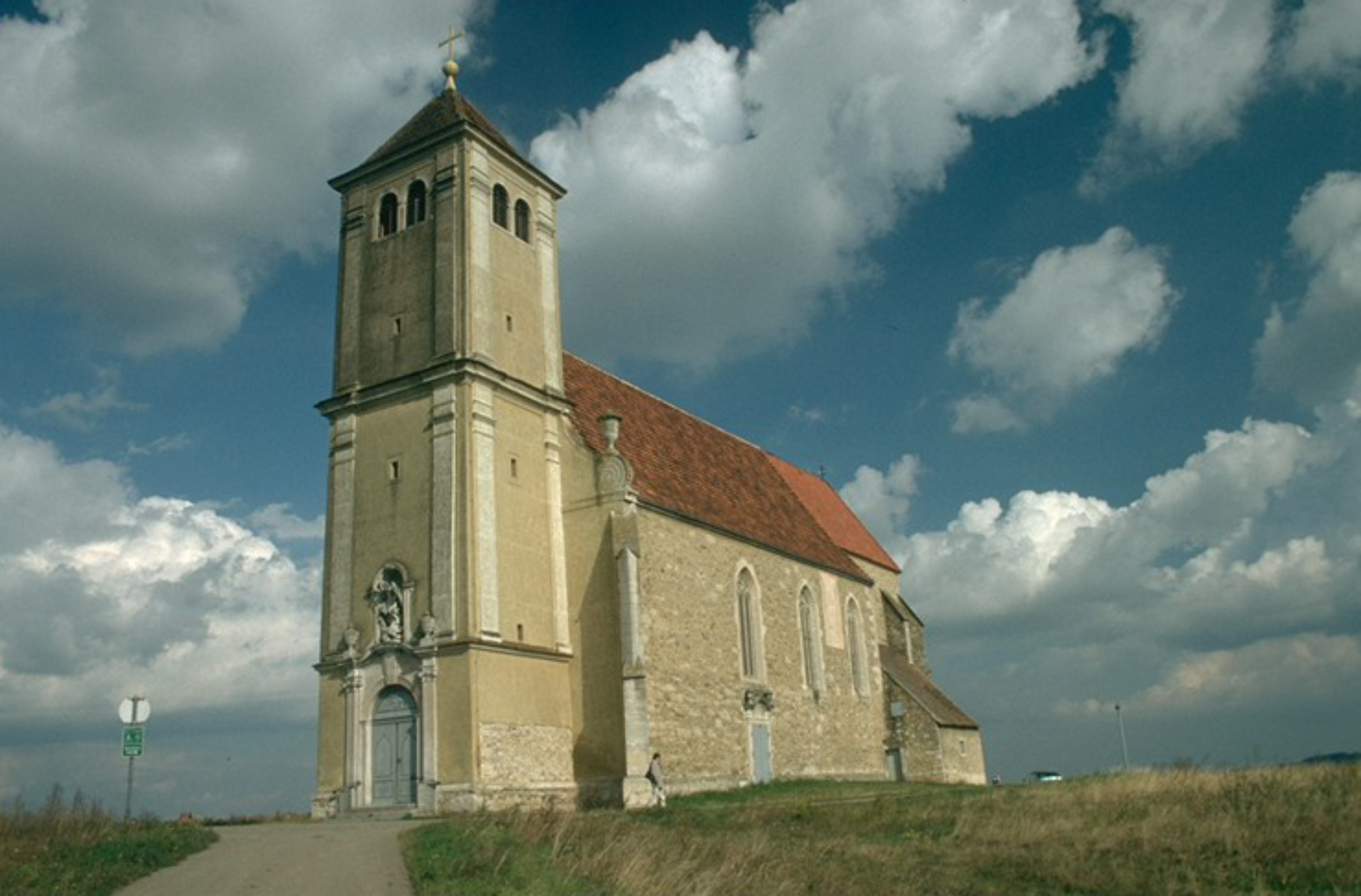 Kath. Pfarrkirche hl. Leonhard